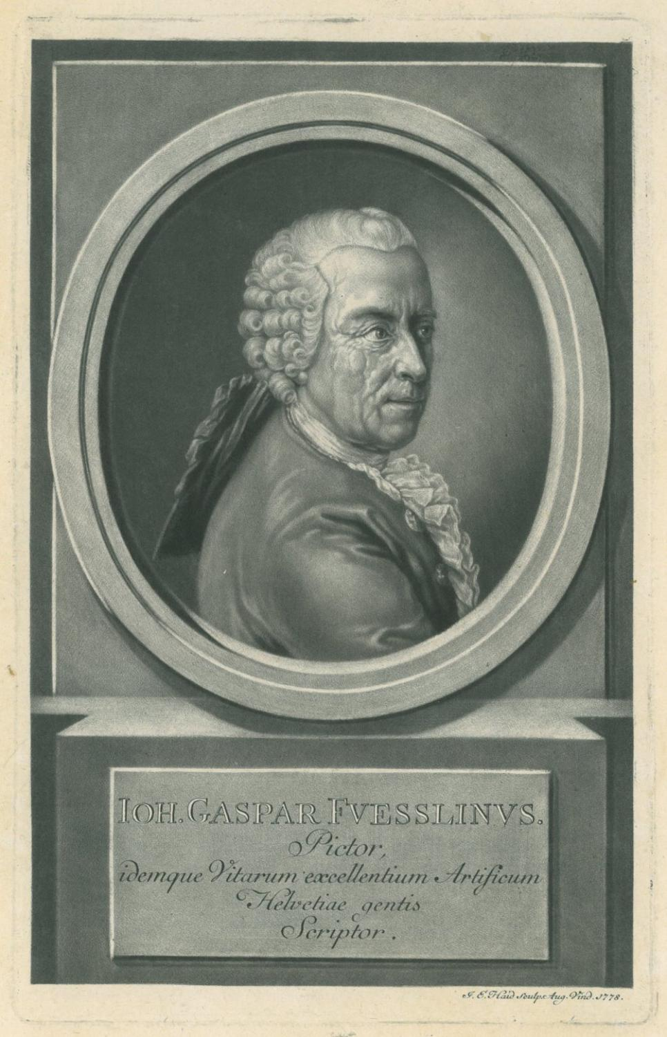 Johann Caspar Füssli(* 3. Januar 1706 in Zürich; † 6. Mai 1782 ebenda), Schweizer Maler und Schriftsteller